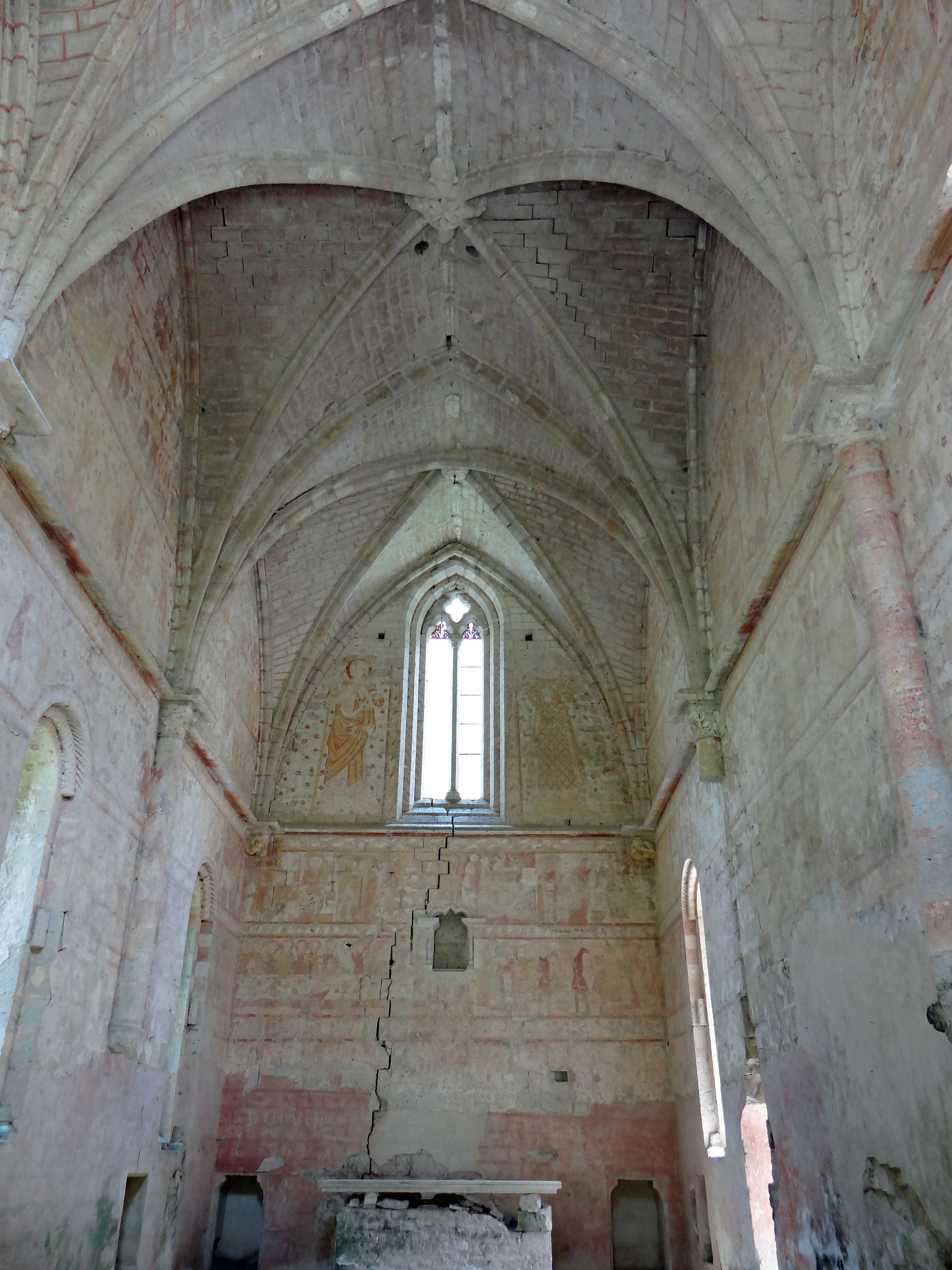 Durance - Prieuré de Lagrange - Intérieur de la chapelle